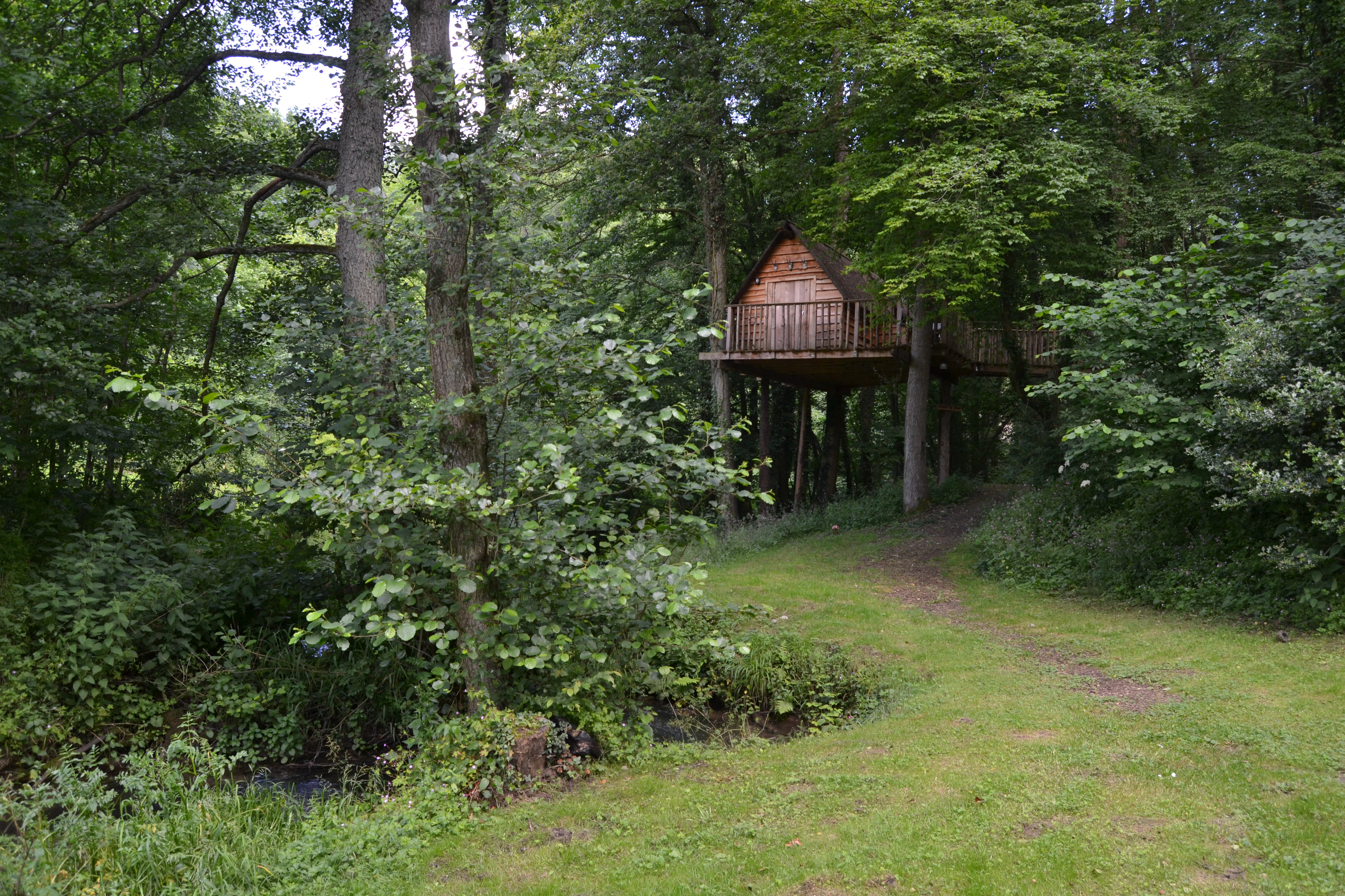 La cabene perchée du Moulin de Lisogne